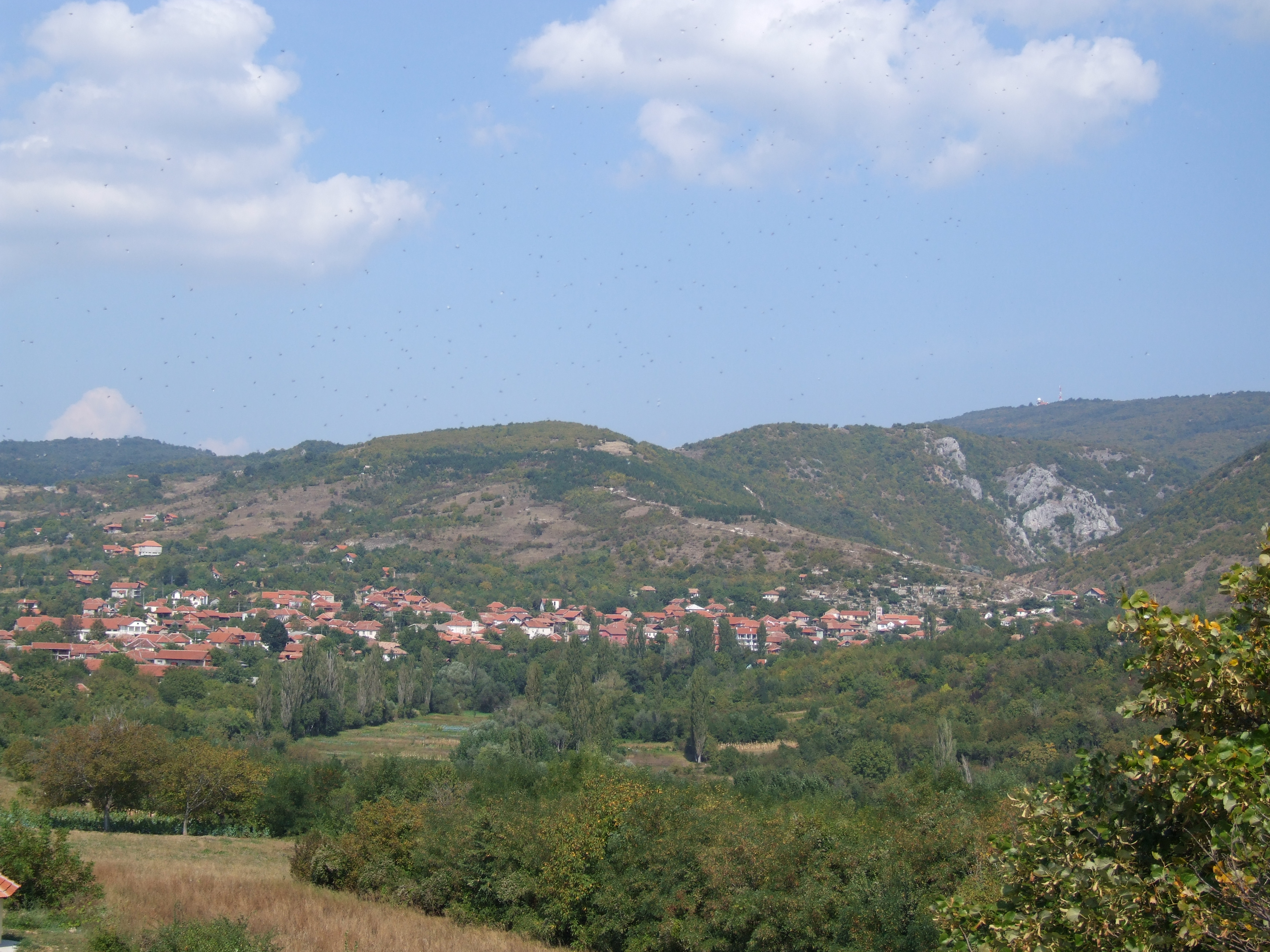 Аутор Драгољуб Здравковић. Панорама села. У позадини је излетиште Каменички вис.